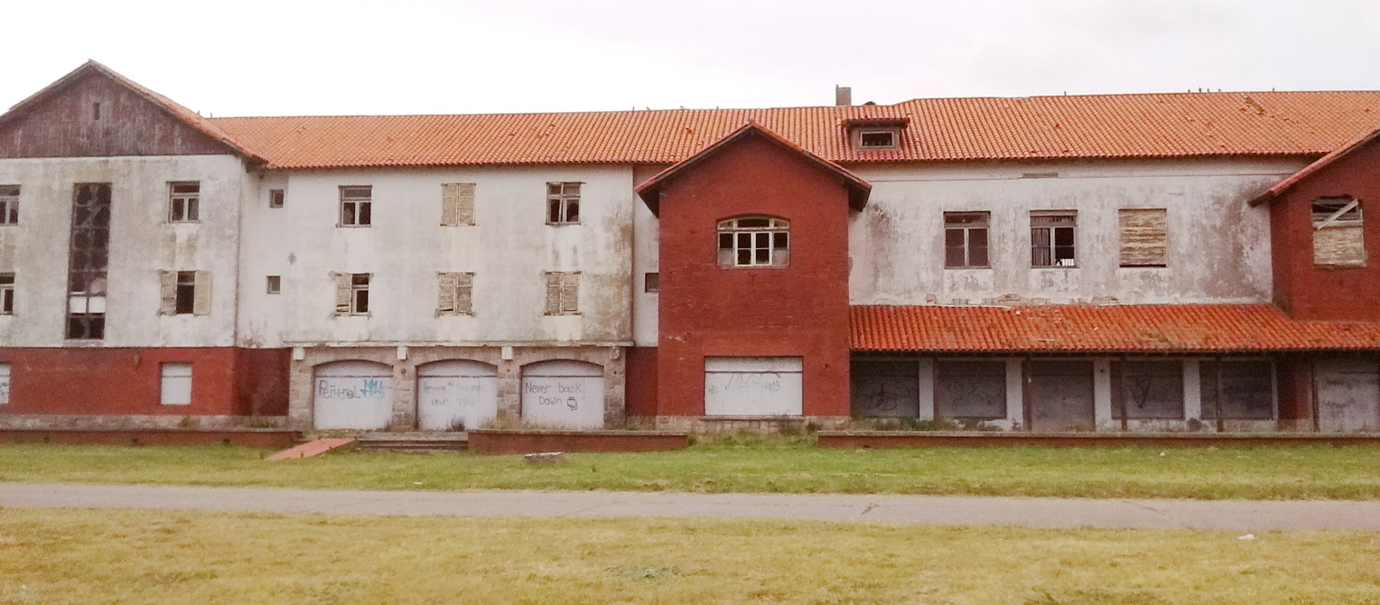 Vista de uno de los hoteles abandonados